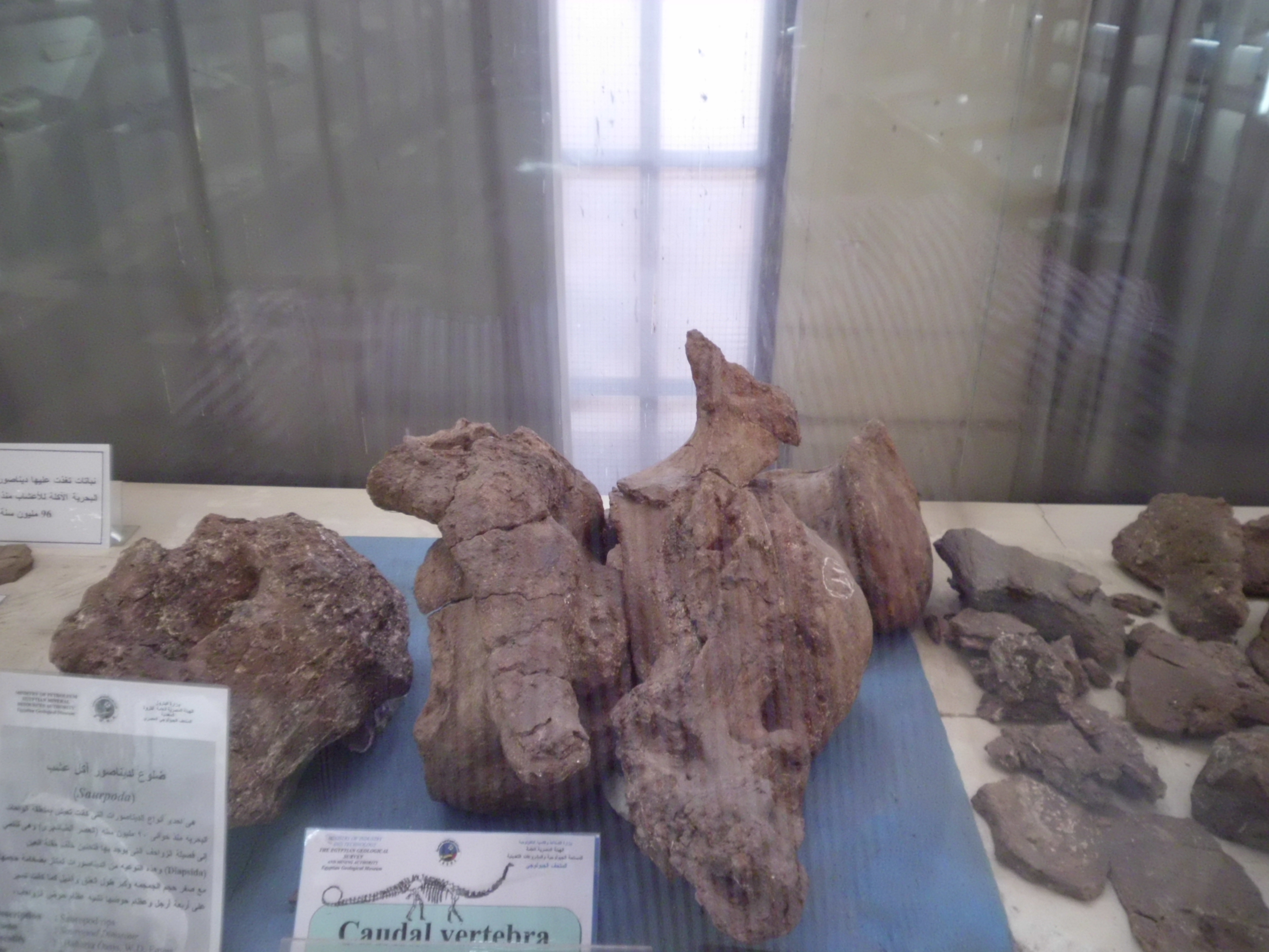 هو احد انواع الديناصورات اكلة الاعشاب في العصر الطباشيري المتاخر بمنطقة الواحات البحرية منذ ما يقرب من 95 مليون سنة وتم اكتشافه بواسطة المساحة الجيولوجية المصرية عام 2000 وكلمة الباراليتيتن كلمة لاتينة تعني (ديناصور المد والجزر) وهو ديناصور اكل للاعشاب يمتاز بحجم جمجمة صغير ورقبة طويلة واطراف امامية مساوية في الطول للاطراف الخلفية وذيل طويل وبلغ وزنه 80 طن وطوله 33,5 متر ويعد ثاني اضخم ديناصور في العالم في العصر الطباشيري وكان فريسه سهله لديناصور اسبينوسورس والكركرودونت سورس والبحرية سورس